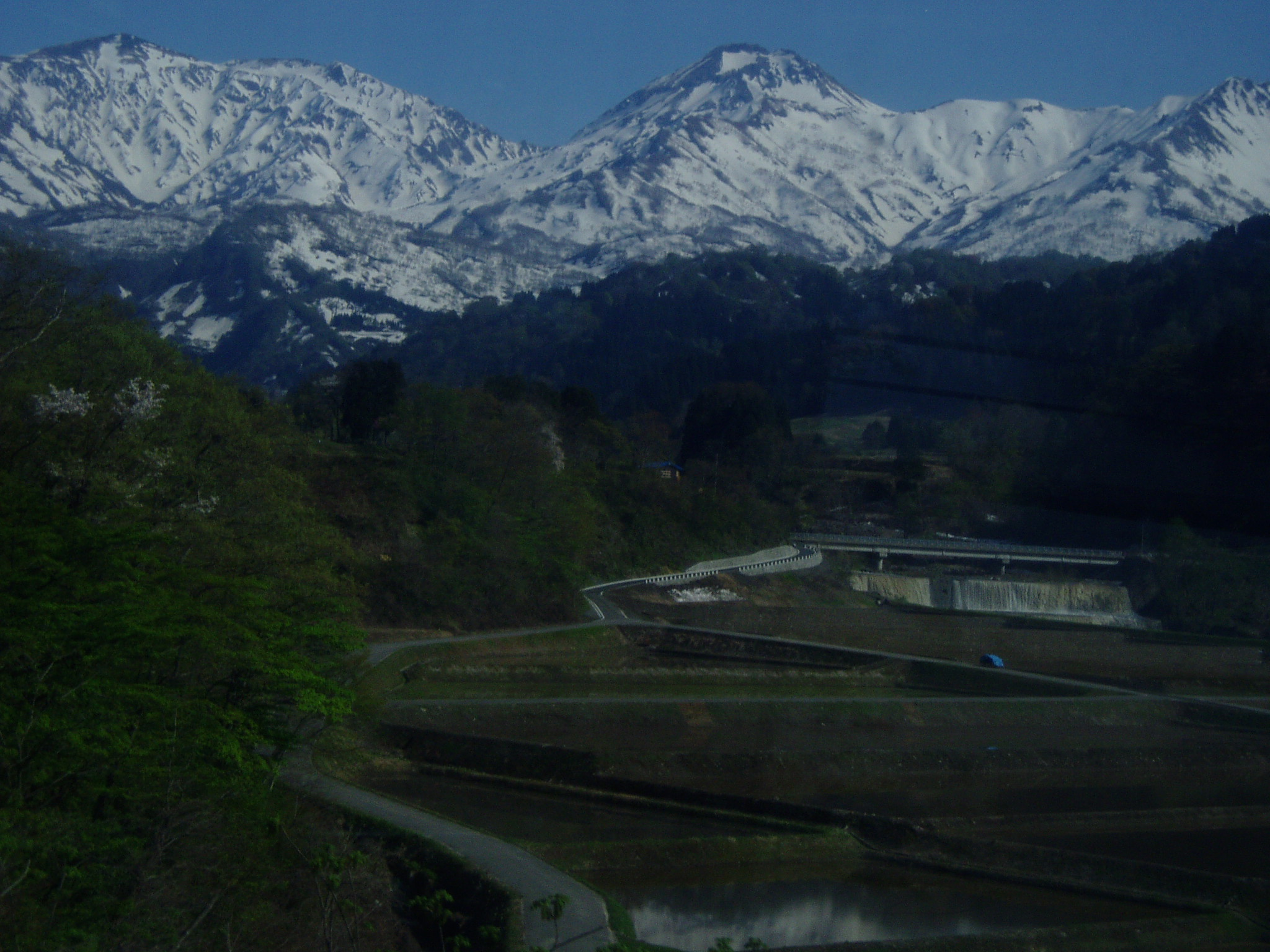 Mount Niigata-Jake-jama